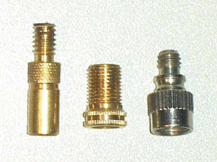 verschiedene Ventiladapter für Fahrräder